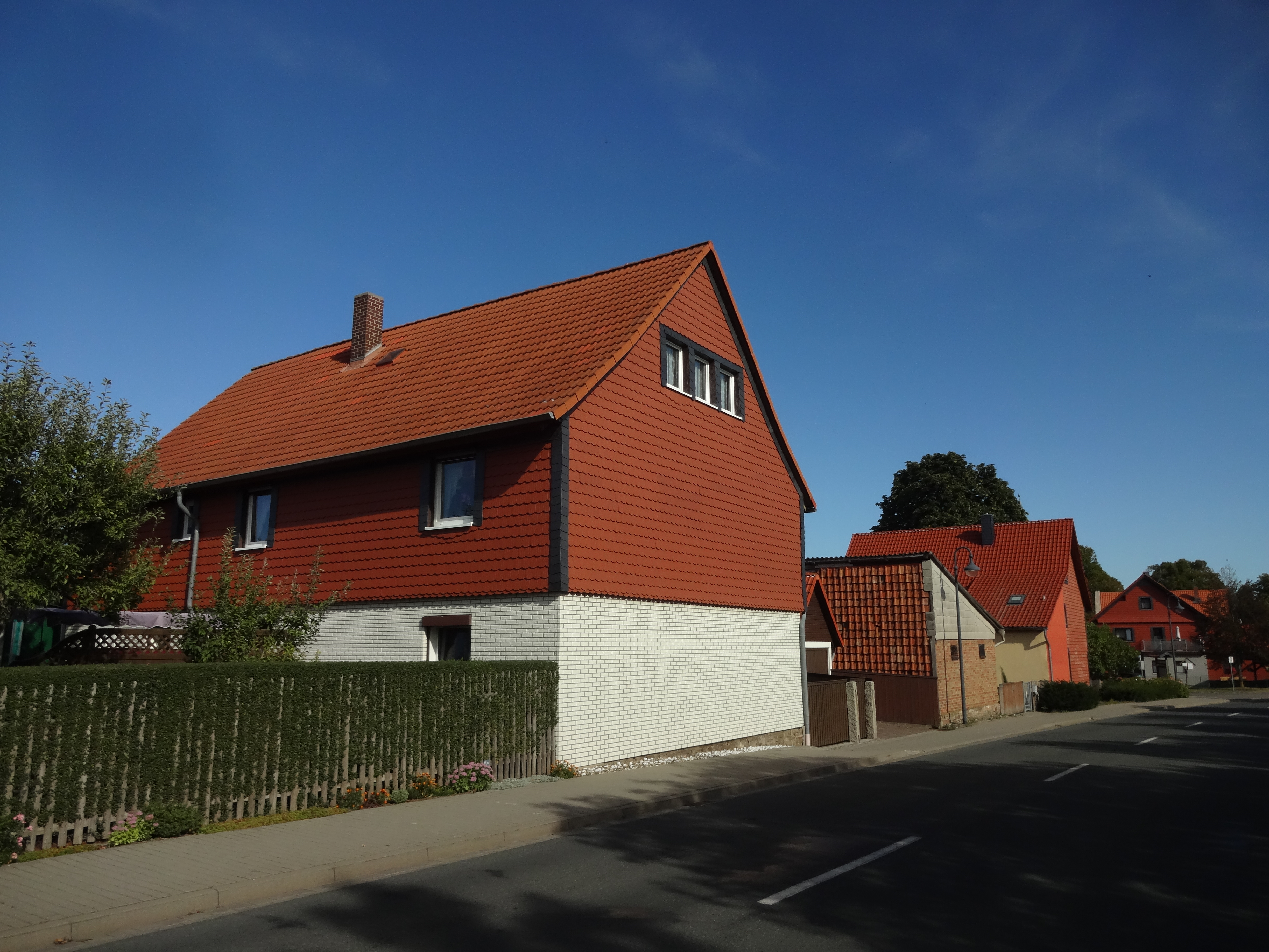 ehemals denkmalgeschütztes Wohnhaus in der Ilsenburger Straße 2 in Drübeck